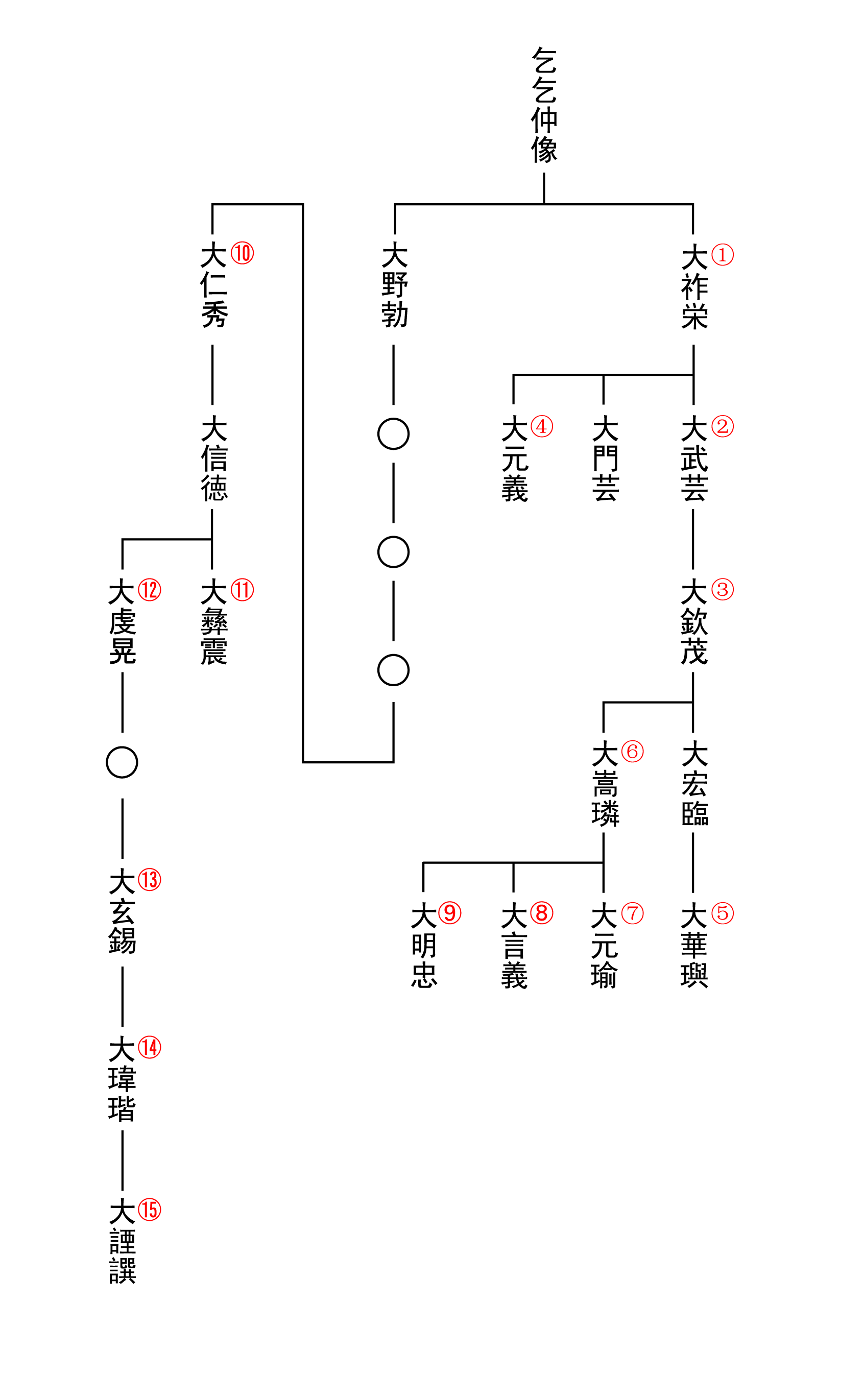 渤海王室系図 投稿者が製作しました